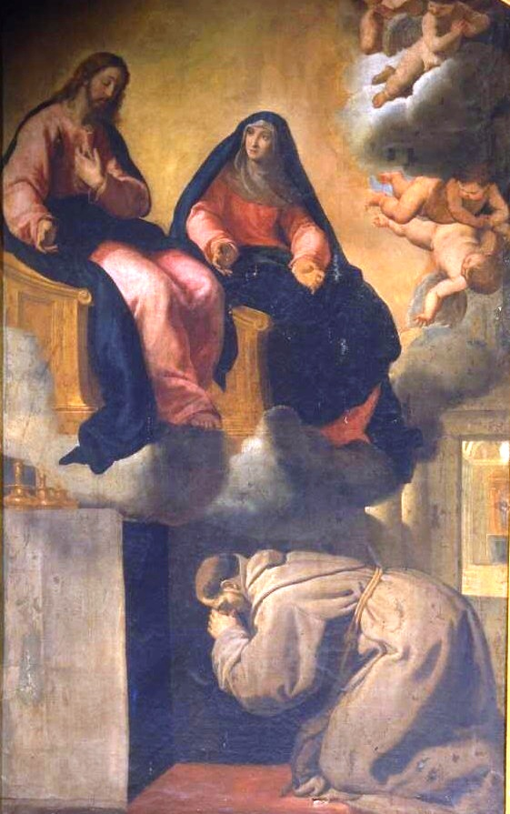 La obra representa a San Francisco de Asís, el fundador de la Orden de los franciscanos, recibiendo de manos de Jesucristo y de la Virgen María la Indulgencia o el Jubileo de la Porciúncula, ya que en 1216 el papa Honorio III concedió una indulgencia plenaria a todos aquellos que visitaran la pequeña iglesia de la Porciúncula, que está situada en el interior de la basílica de Nuestra Señora de los Ángeles de Asís, en Italia.